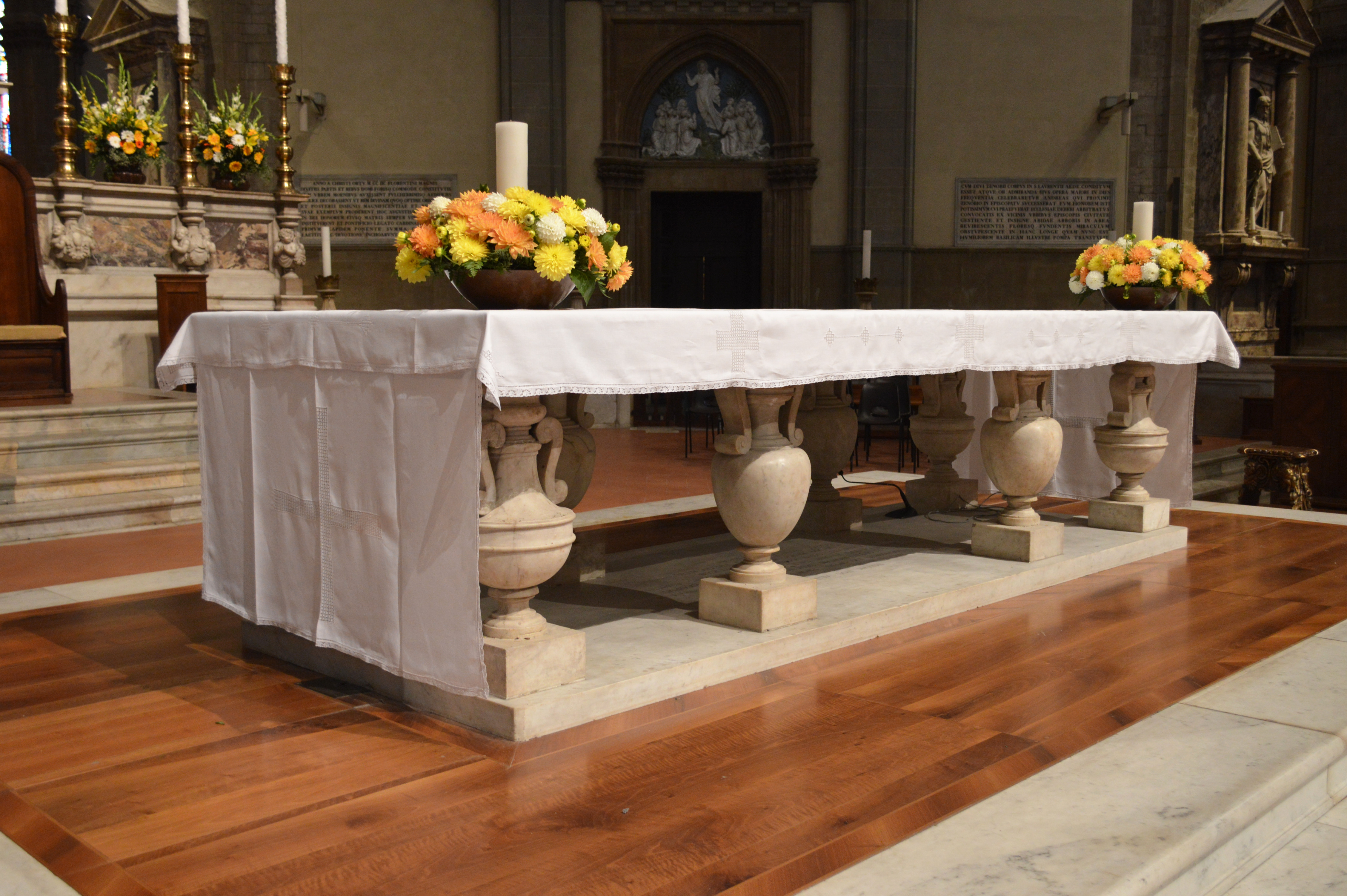 L'altare maggiore.